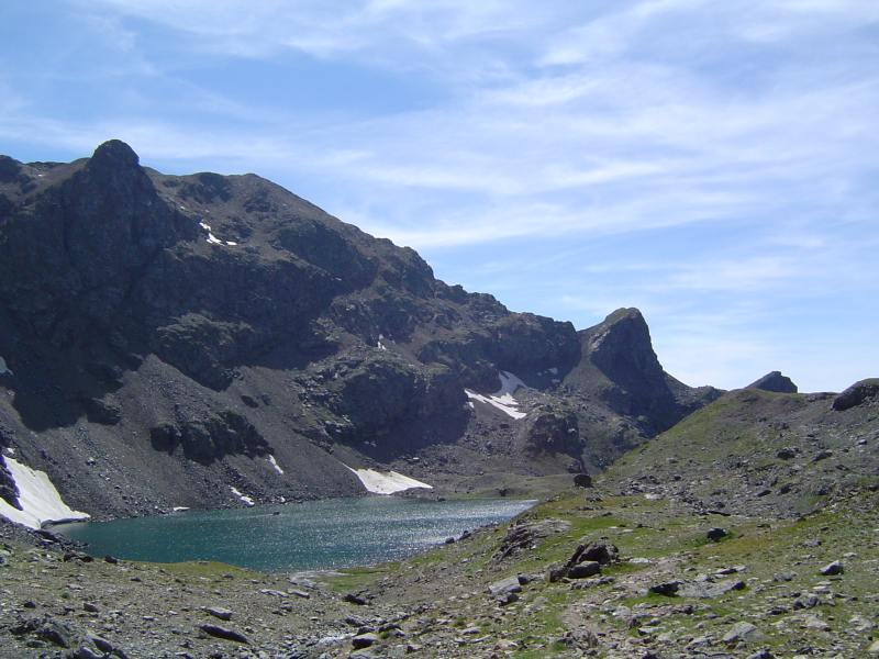 Photo du lac du Grand Doménon dans le massif de Belledonne.